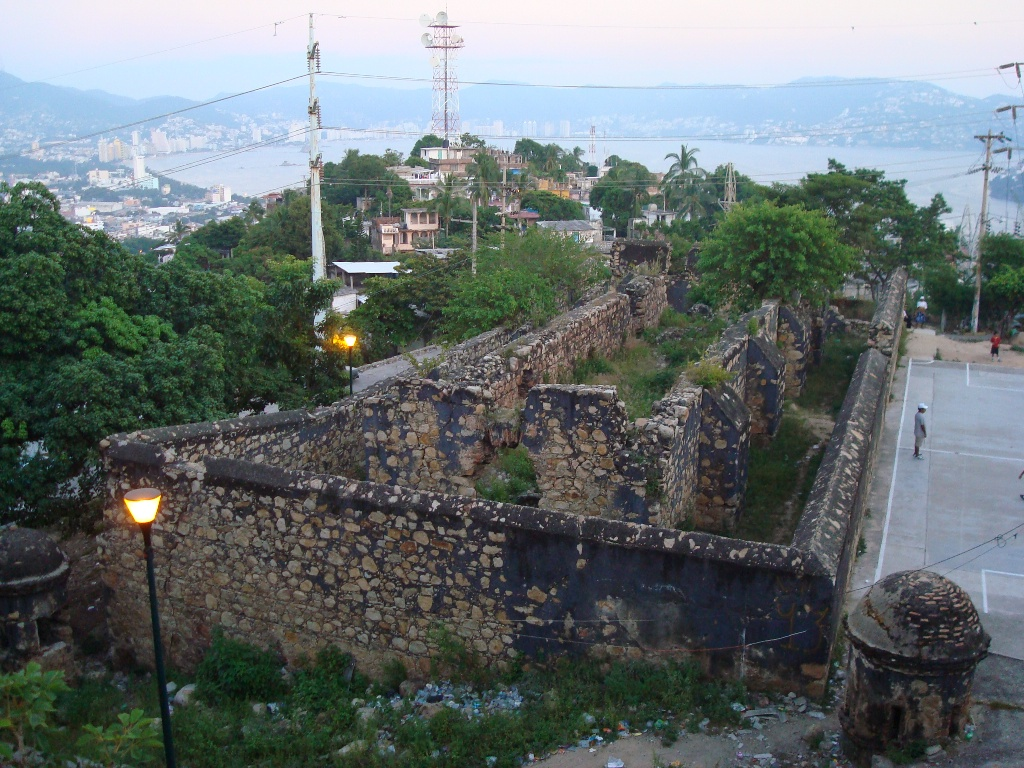 El Fortín Álvarez en el cerro de la Mira de Acapulco, Guerrero, México. Al fondo, la bahía de Santa Lucía.